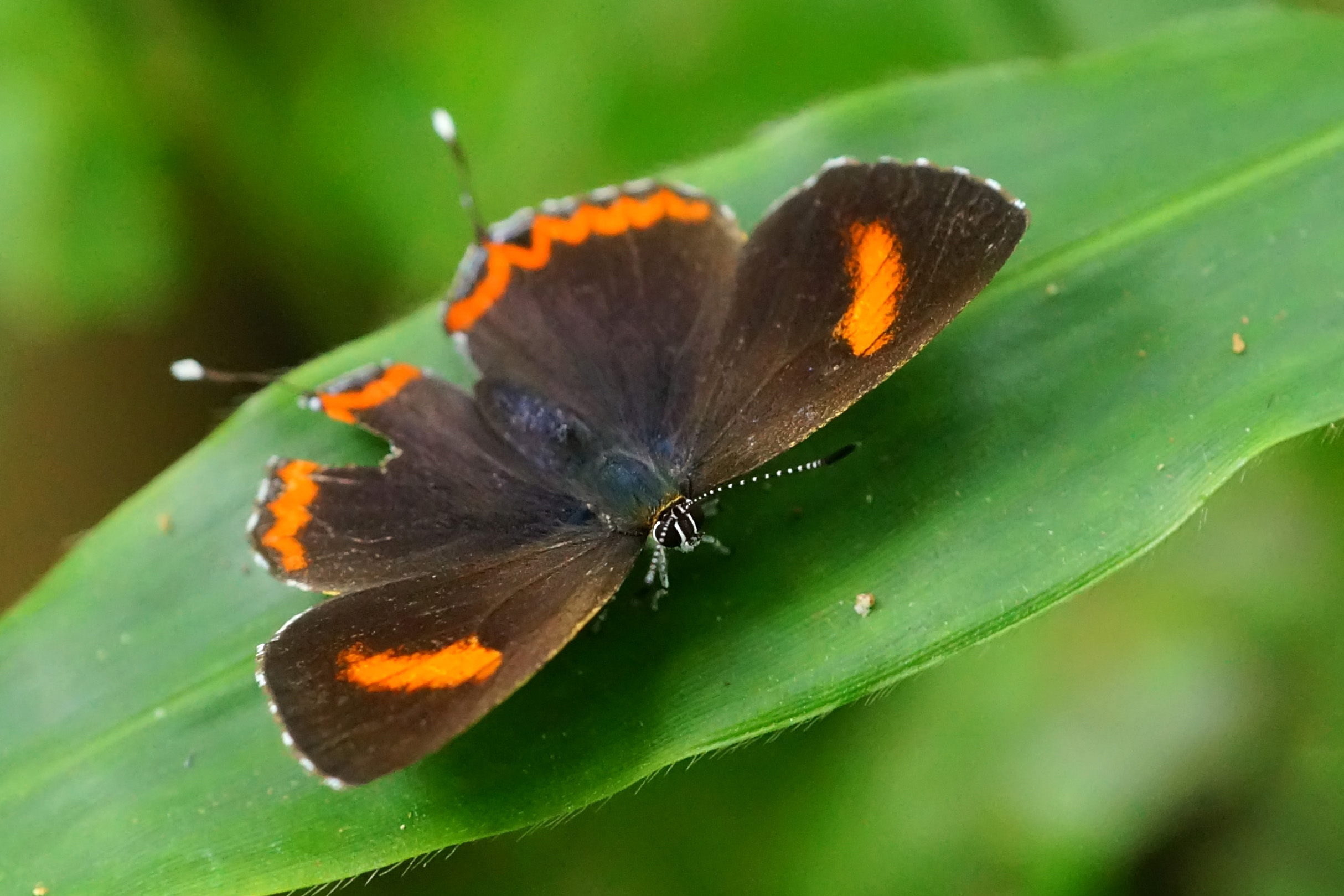 紫日灰蝶 Heliophorus ila matsumurae